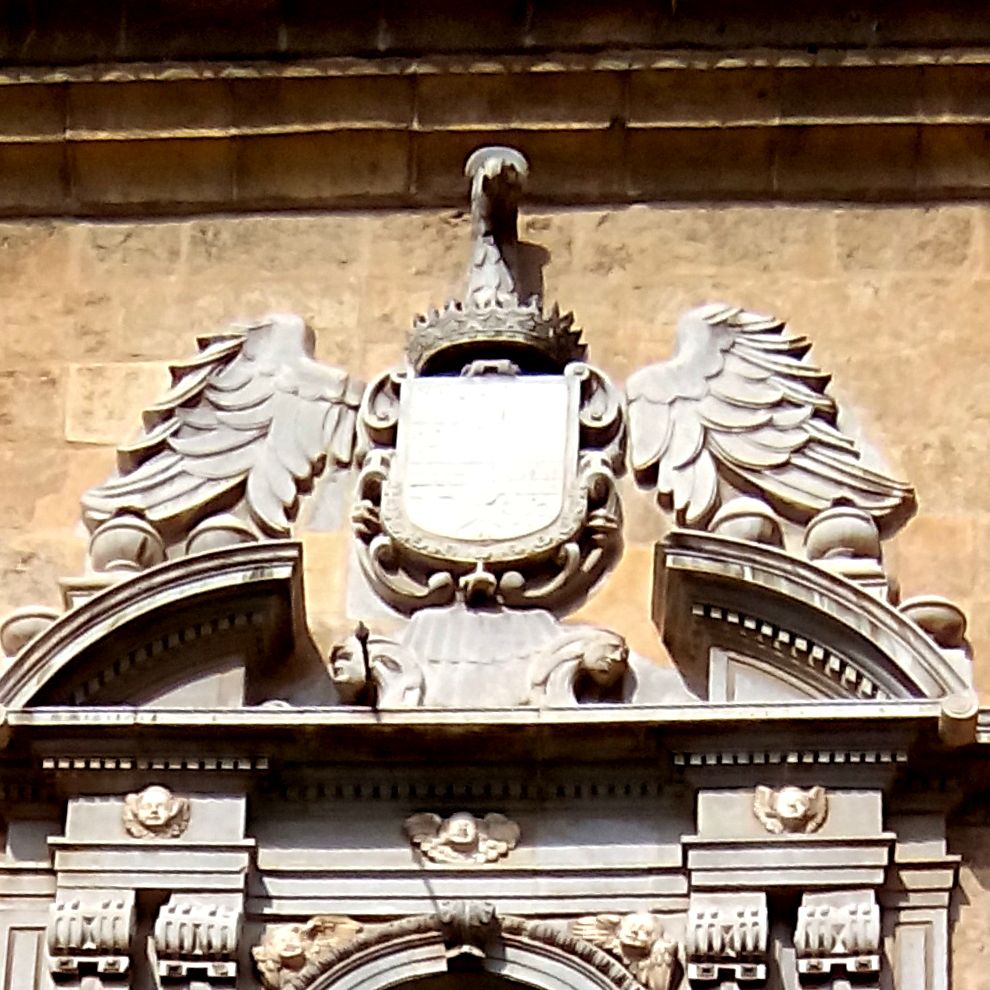 La portada de piedra de Sierra Elvira está coronada por este escudo con el águila de San Juan